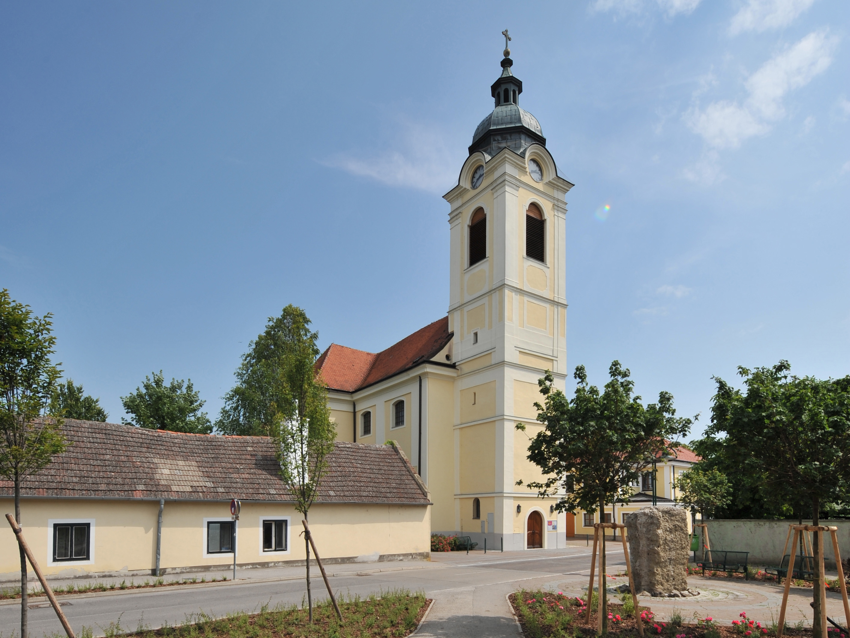 Biedermannsdorf: Kath. Pfarrkirche hl. Johannes der Täufer